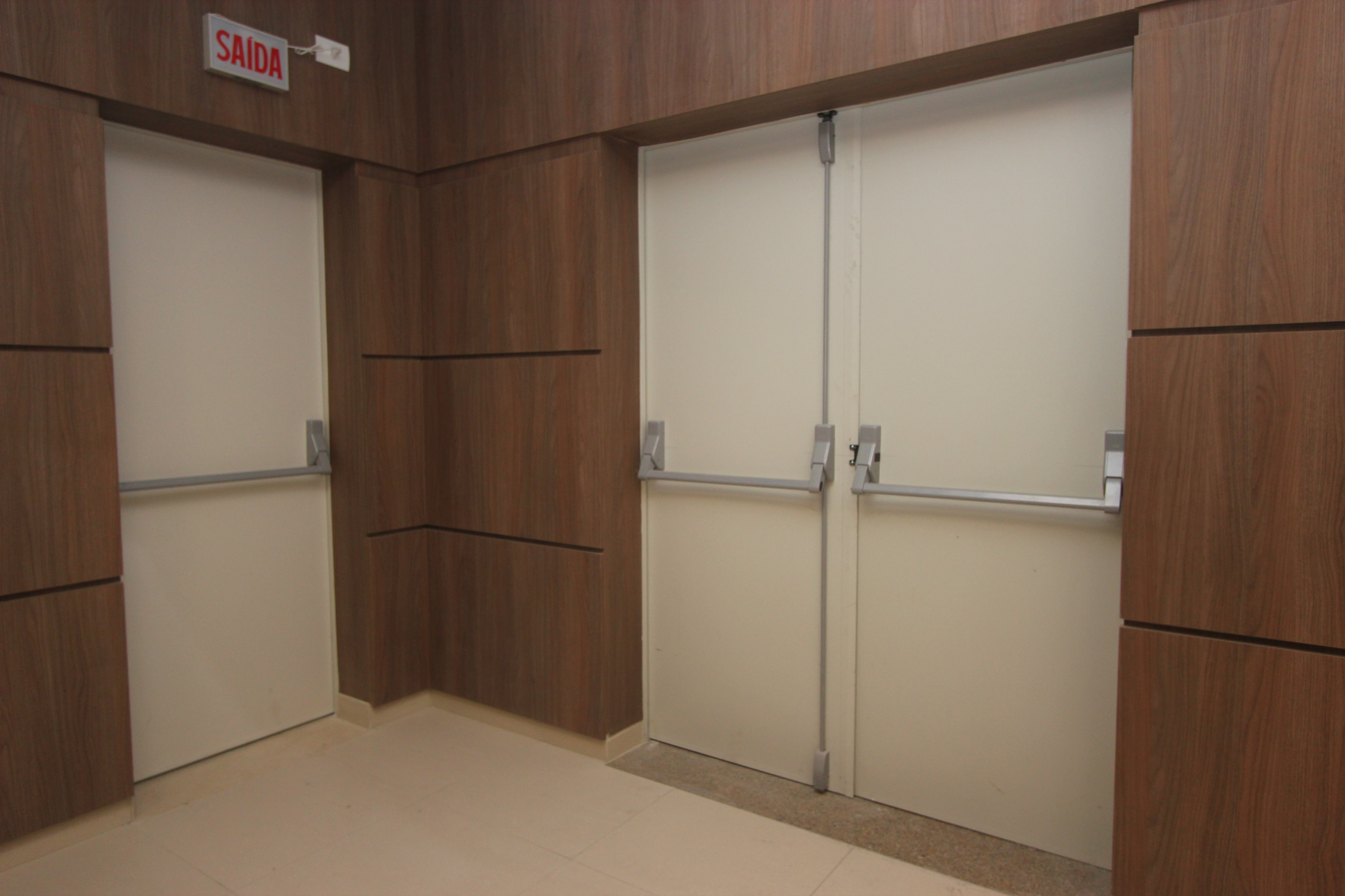 Porta corta fogo folha simples e dupla, por PCF BRASIL